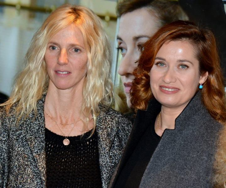 Sandrine Kiberlain et Emmanuelle Devos à l'avant-première du film "Violette".